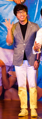 안아줘 제작발표회